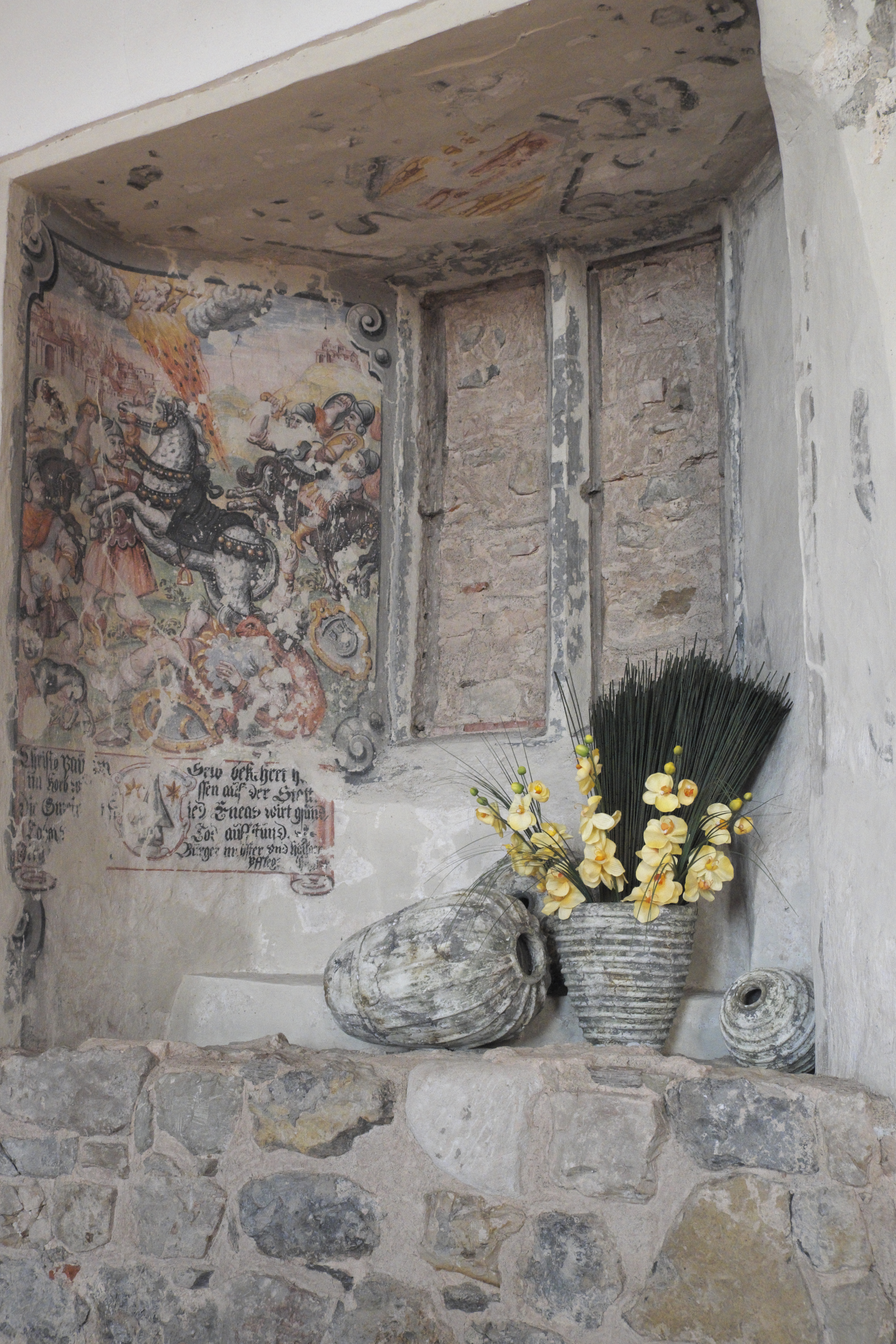 Stadtkirche in Rosenfeld im Zollernalbkreis (Baden-Württemberg/Deutschland), Wandmalerei